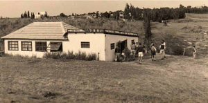 המבנה המקורי של בית הספר הרב תחומי עמל למדעים ואמנויות ע"ש קלמן צהר